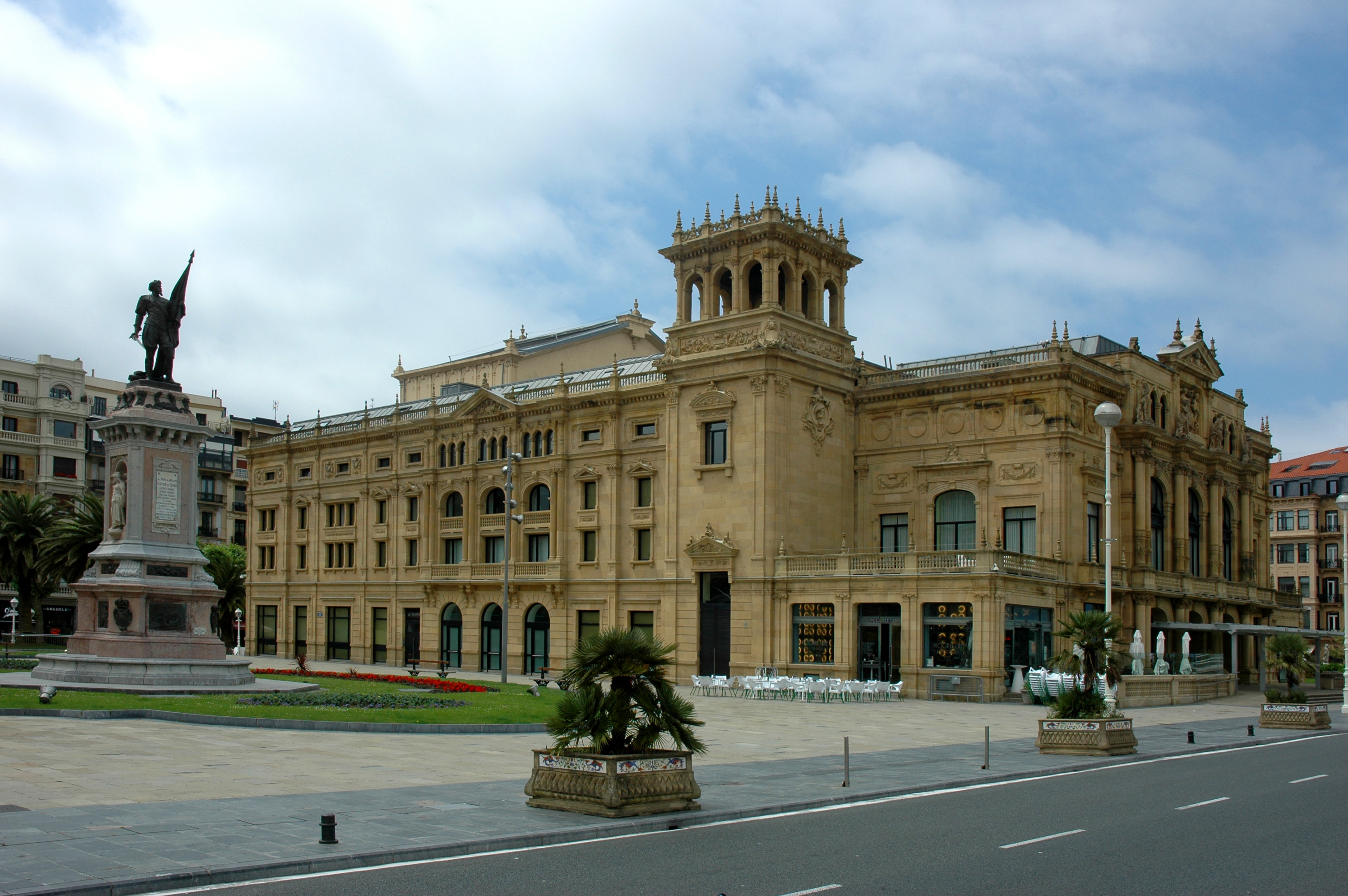 Théâtre Victoria EugeniaEuskara: Victoria Eugenia Antzokia